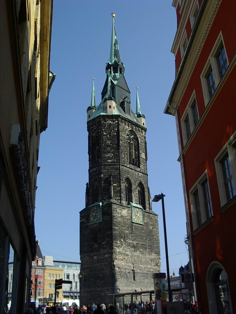 Halle (Saale) Roter Turm - Blick vom Graseweg